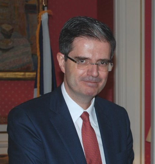 François Delattre, l'ambassadeur de France à Washington